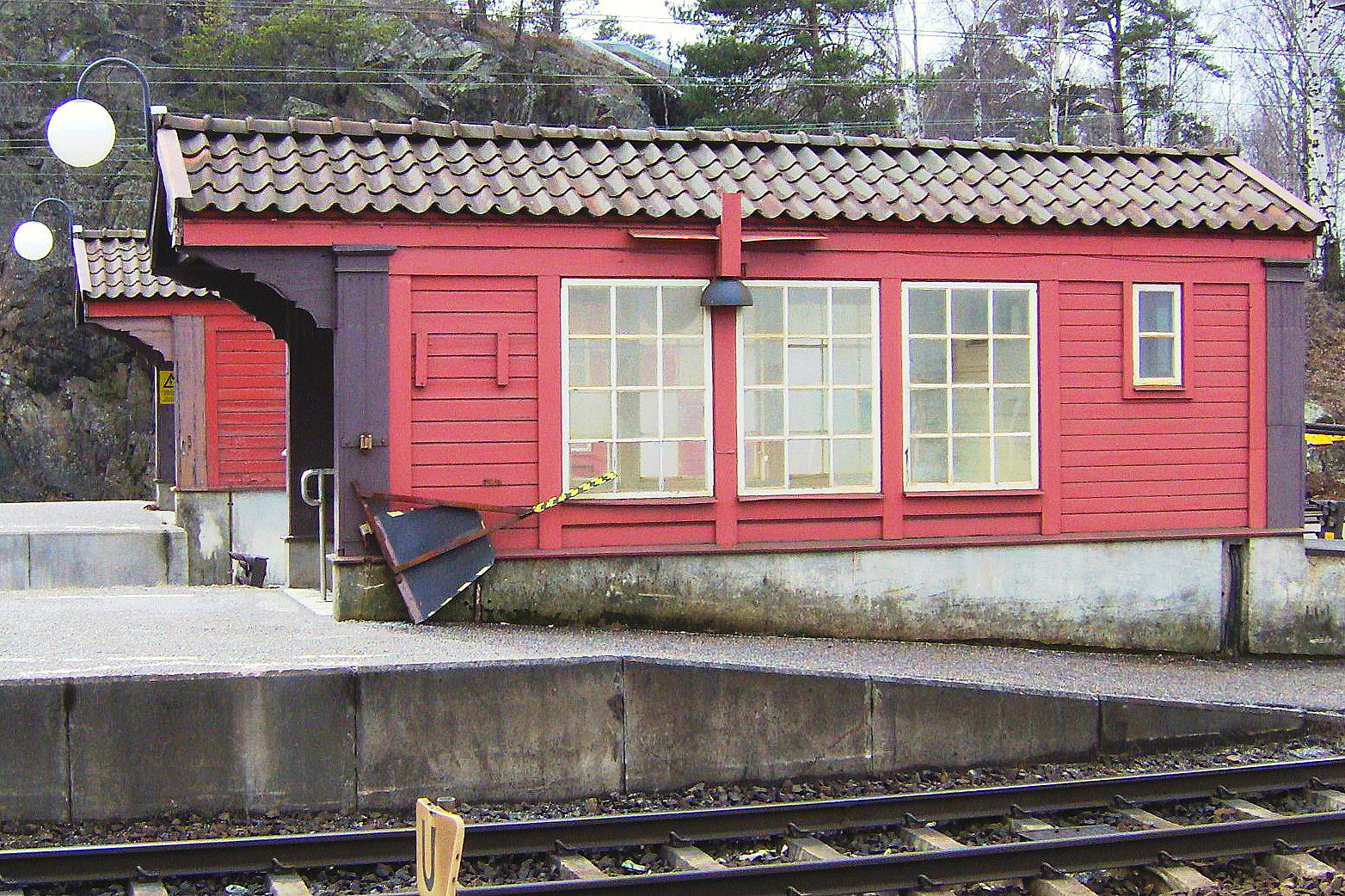 De smala trapphusen vid Södertälje Hamn pendeltågstation The narrow flight of stairs at Södertälje Hamn commuter train station.